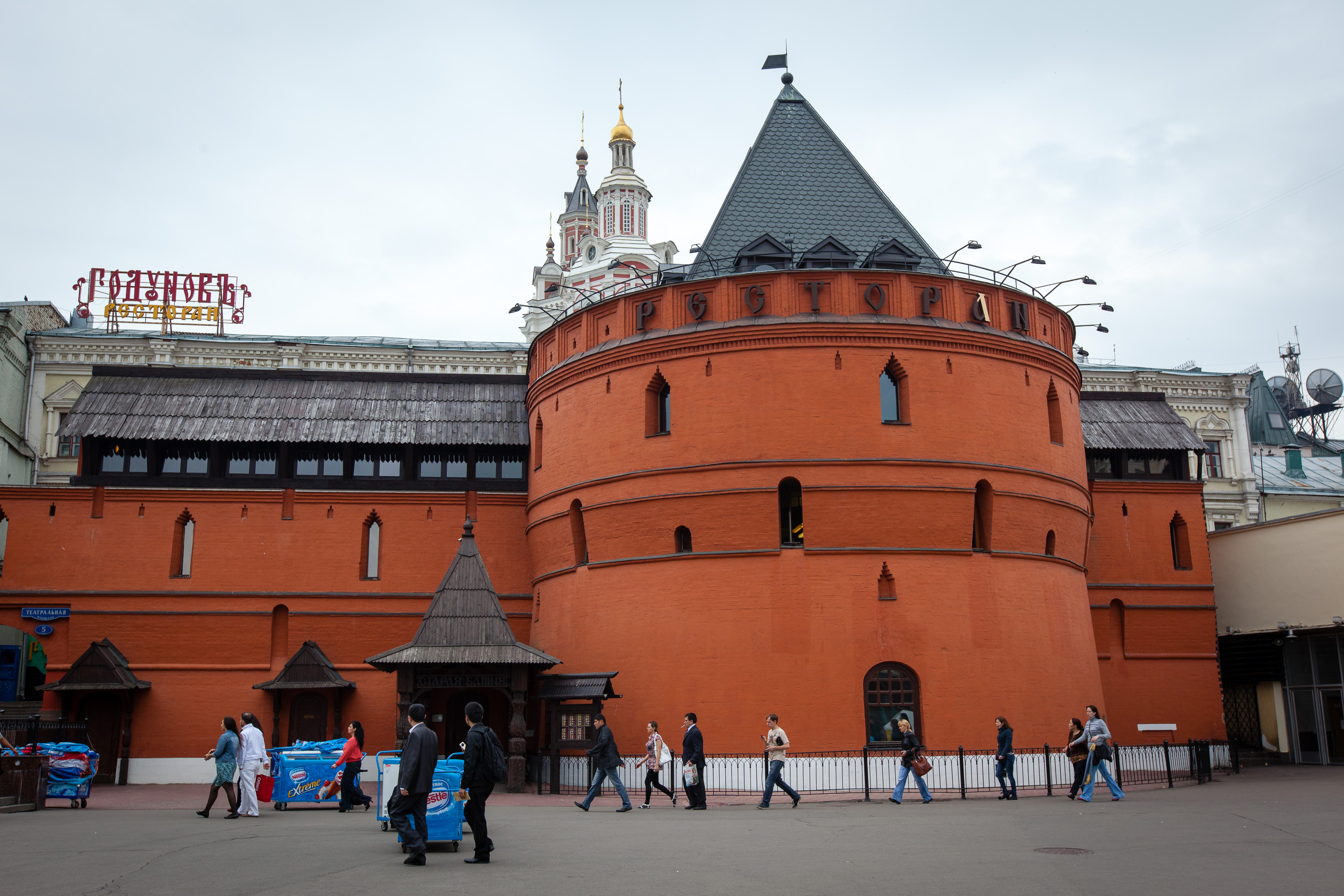 Moscow